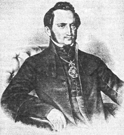 Michał Kuziemski, unicki biskup chełmski w l. 1868-1871, grafika Karola Auera na podstawie obrazu Alojzego Reichana